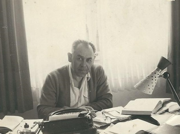 נתן פרסקי בחדר עבודתו